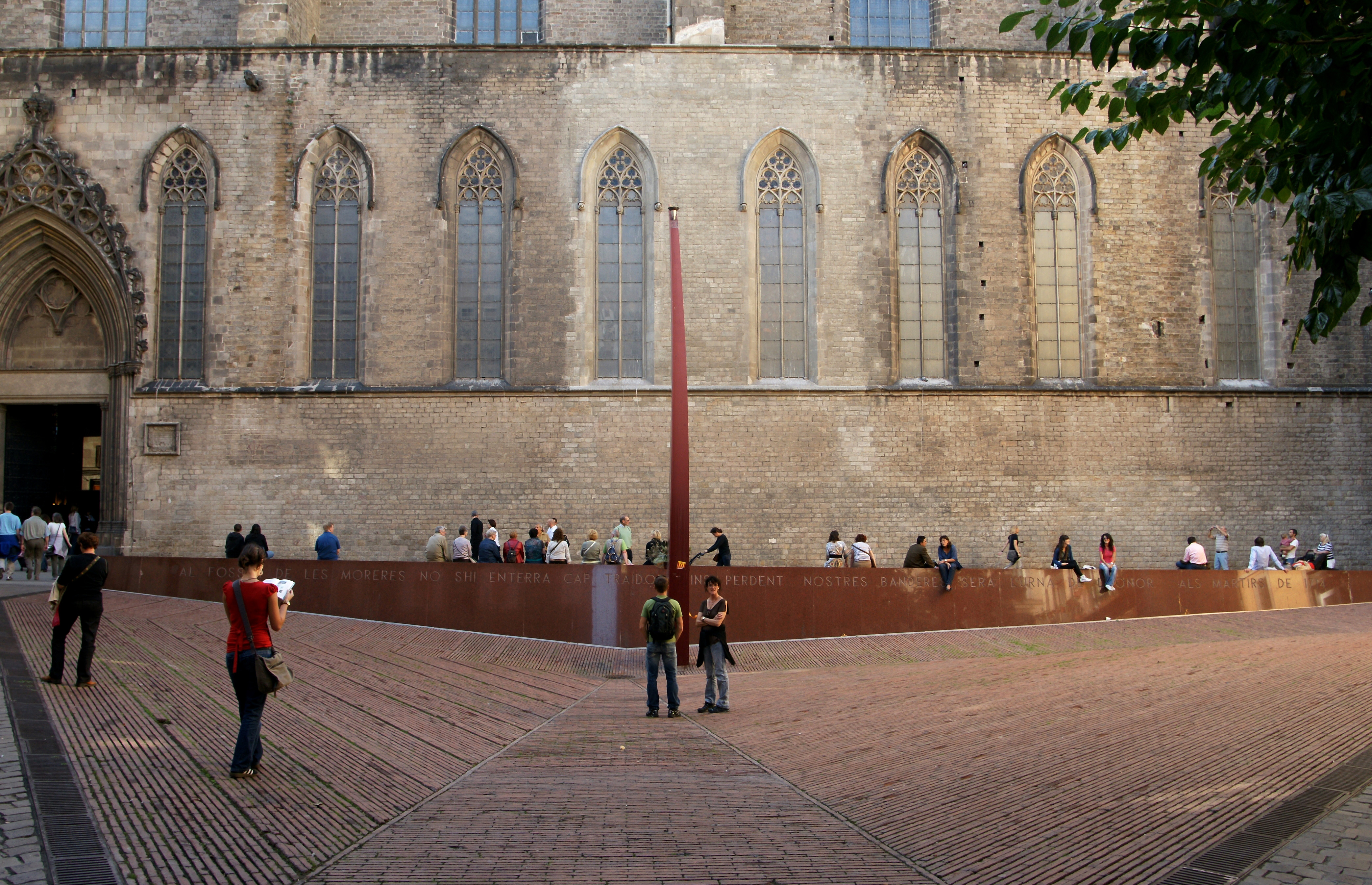 Blick von der "Carrer del Malcuinat" auf das Fossar de les Moreres (Kriegerdenkmal) (Fackel mit der ewigen Flamme und einem heroischen Gedicht von Frederic Soler vor der Santa Maria del Mar in der Nähe des Hafen von Barcelona.